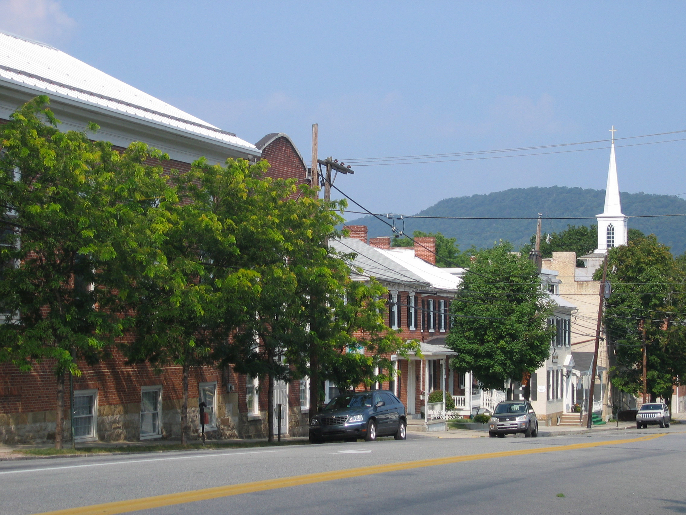 East Penn Street in Bedford, Pennsylvania.